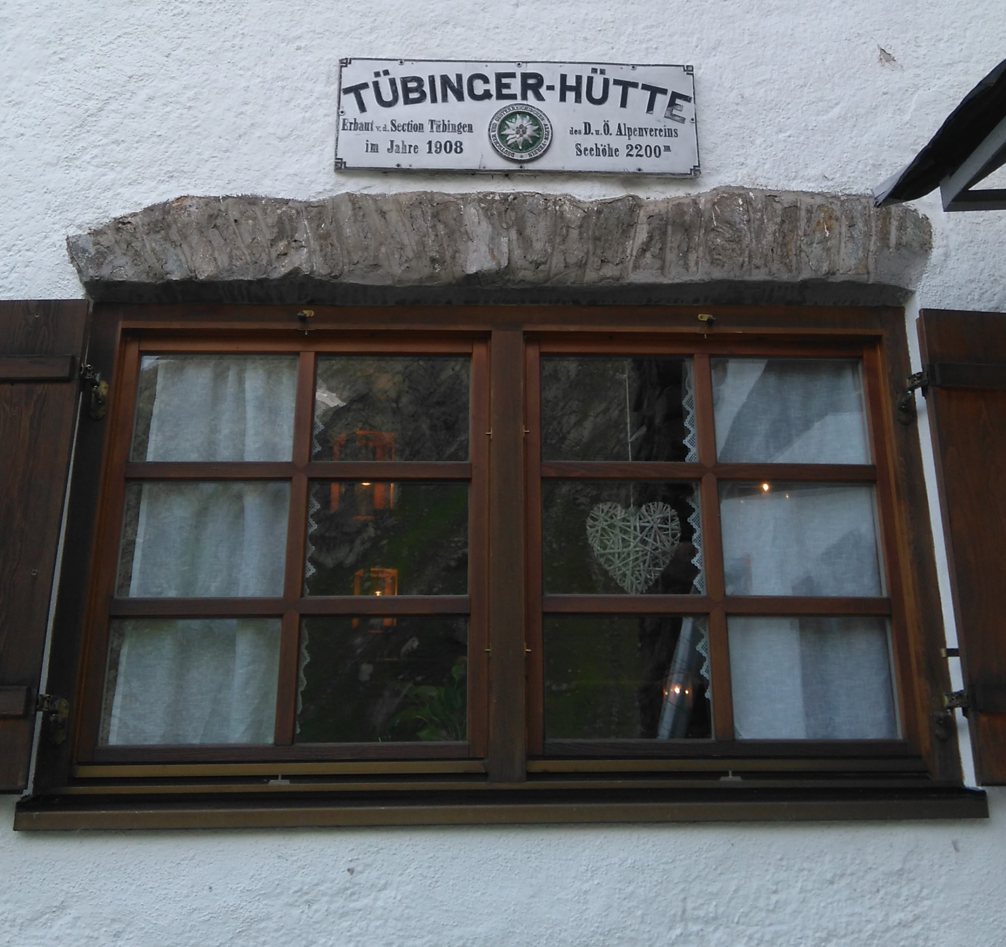 Schild an der Tübinger Hütte